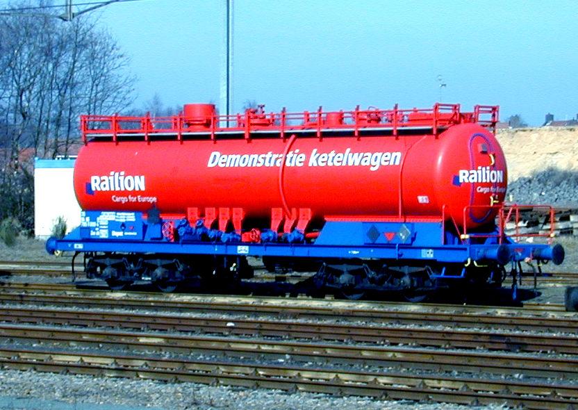 Demostartie ketelwagen van DB Schenker Rail.